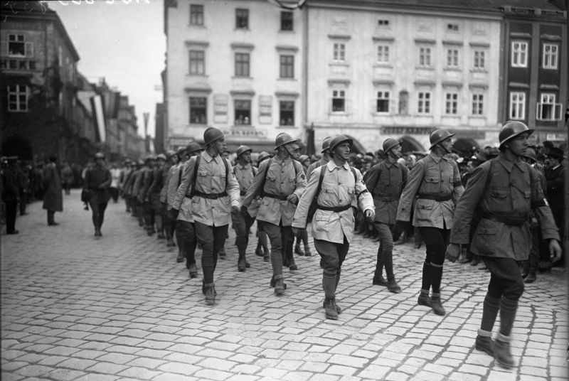 Oesterr. Sozialist. Schutzbündler